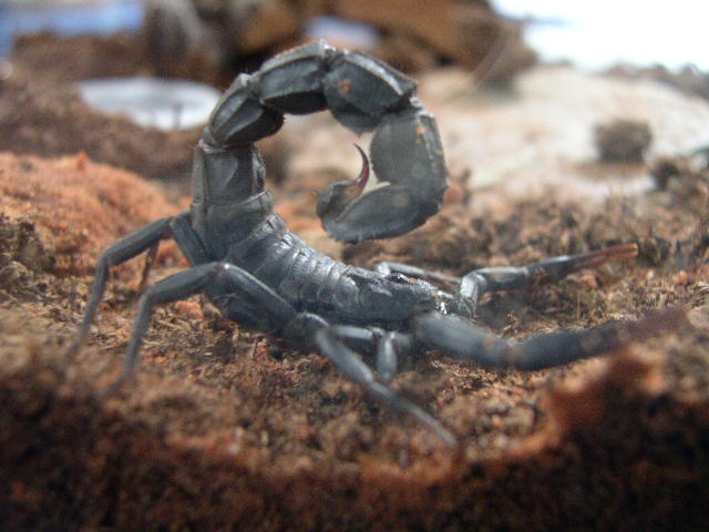 Androctonus mauritanicus appartenant a Gilou, éleveur de scorpions (utilisateur d"Insectopia") Gilou Insectopia